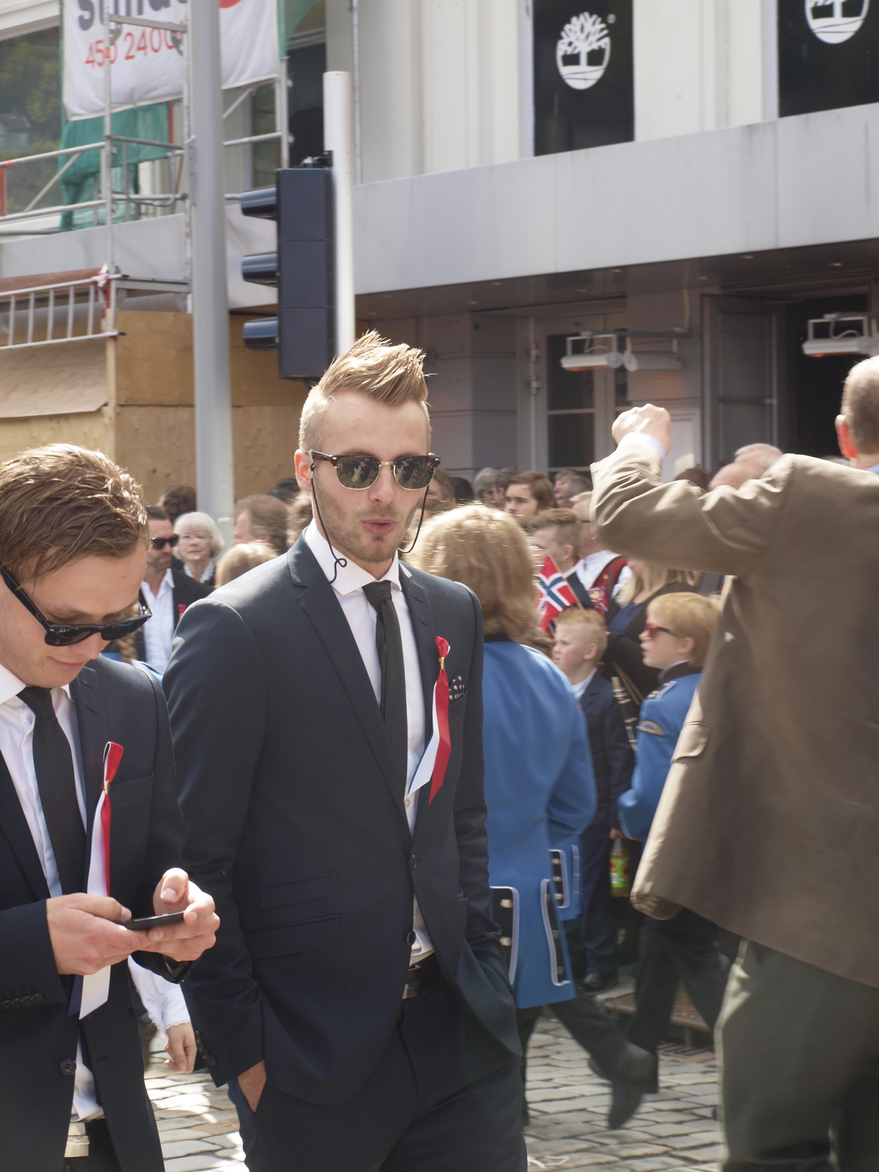 Kristoffer Larsen in 2014